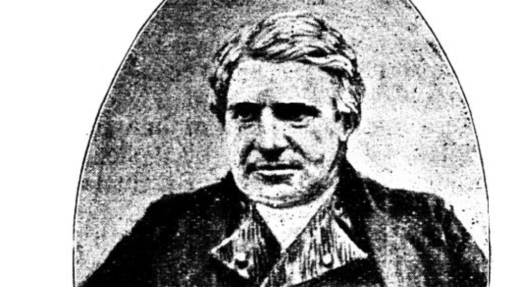 Cenhadwr o Wynfe a aeth i Fadagasgar.